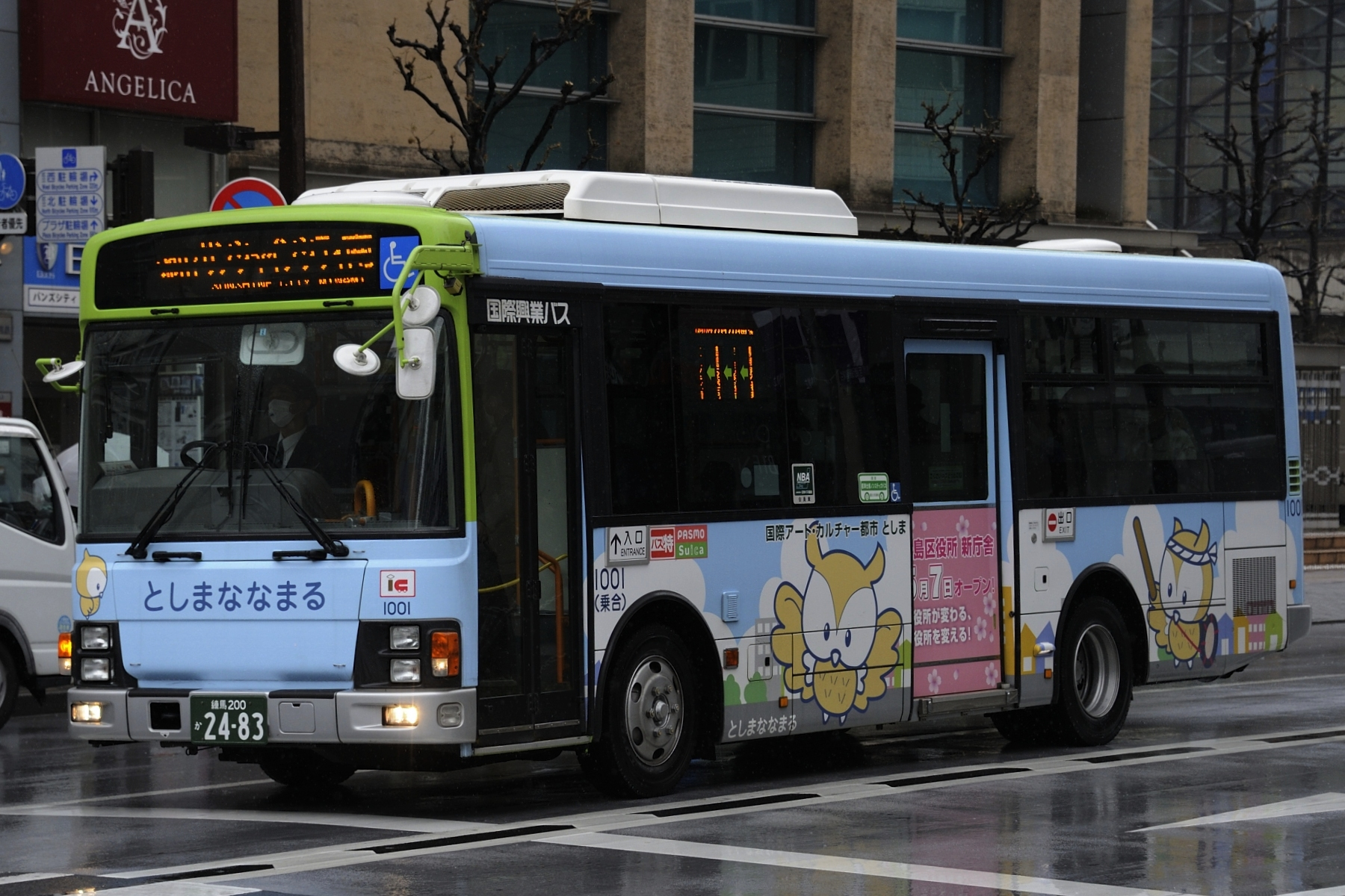 国際興業バス1001号車。「としまななまる」こと池07の専用車。